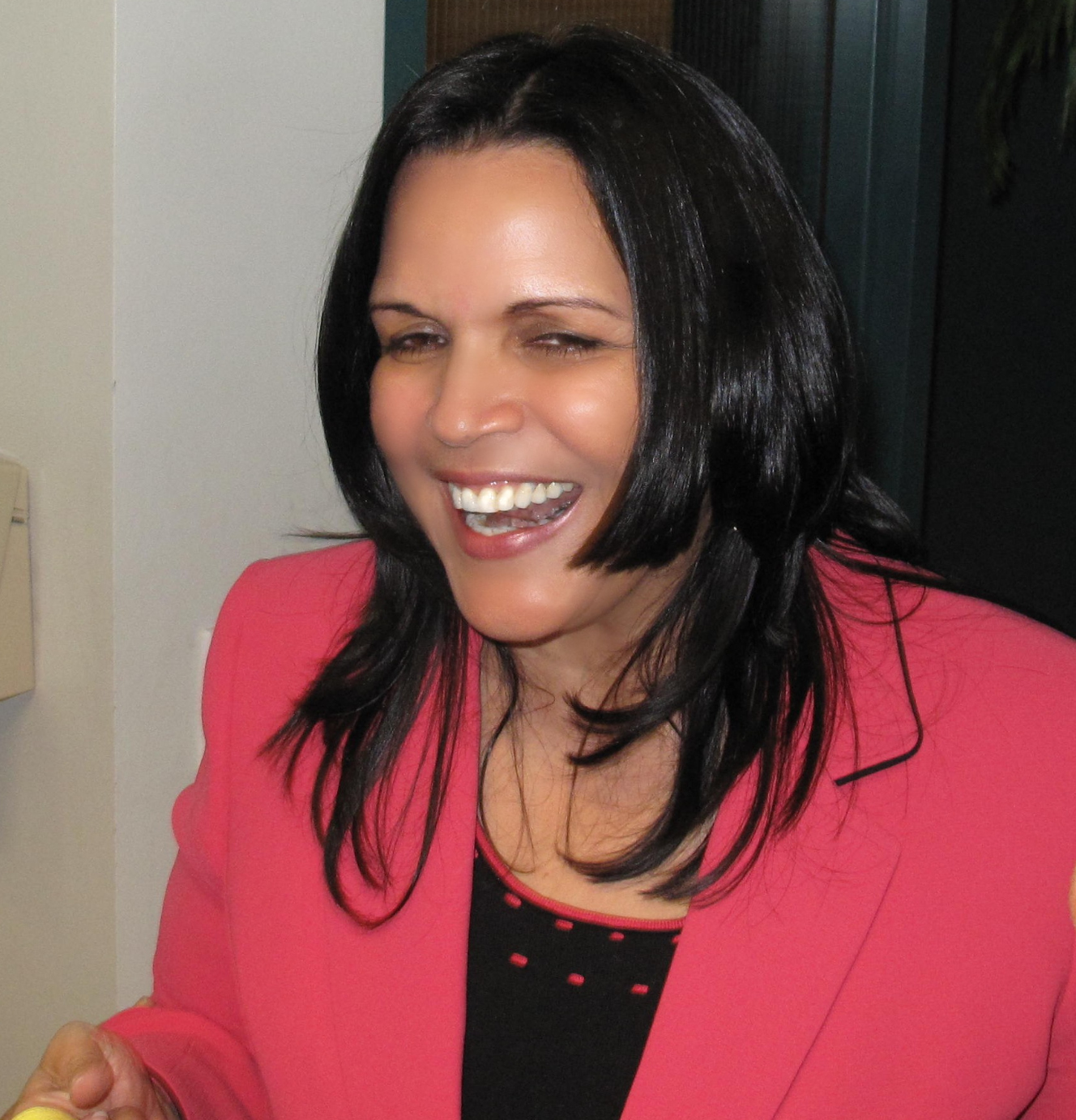 Minou Tavares Mirabal